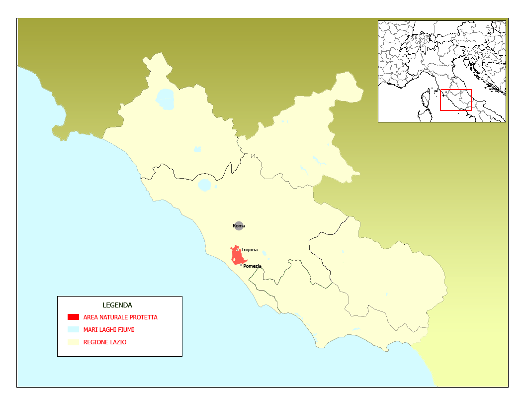 Mappa del Parco Decima- Malafede, Lazio, Italia